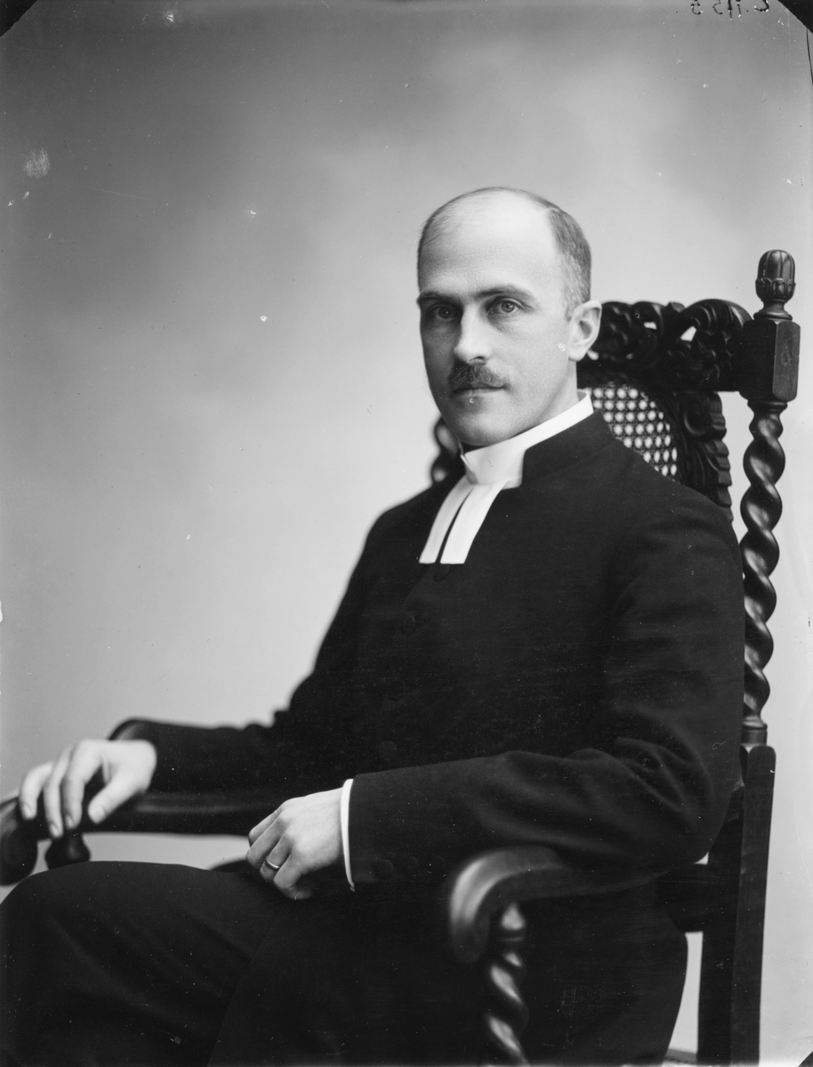 Född i Bollnäs 1888, död 1967. Präst sedermera biskop. Utbildad vid Uppsala Universitet: teologie kandidat 1912, teol. lic 1920 och teol. dr. 1935. Prästvigdes 1915 och arbetade sedan i Stockholm. Blev komminister i Heliga Trefaldighets församling 1924 och kyrkoherde där 1935. 1935-43 dessutom extra ordinarie hovpredikant. 1938-56 var Bengt Jonzon biskop i Luleå Stift.